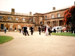 Hillsboroughcastle Quell: englesch Wiki vum User TSP